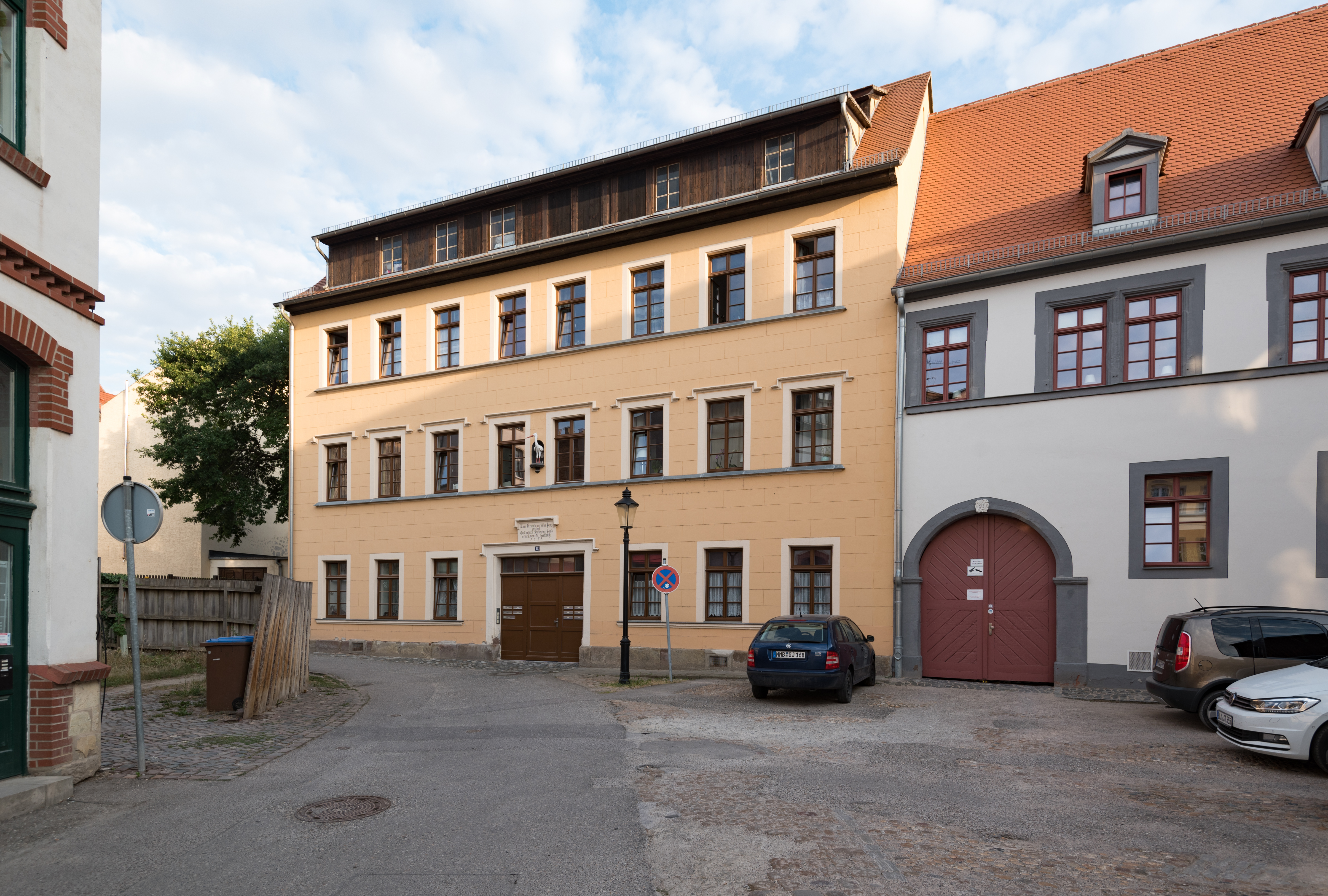 Naumburg (Saale), Reußenplatz 12